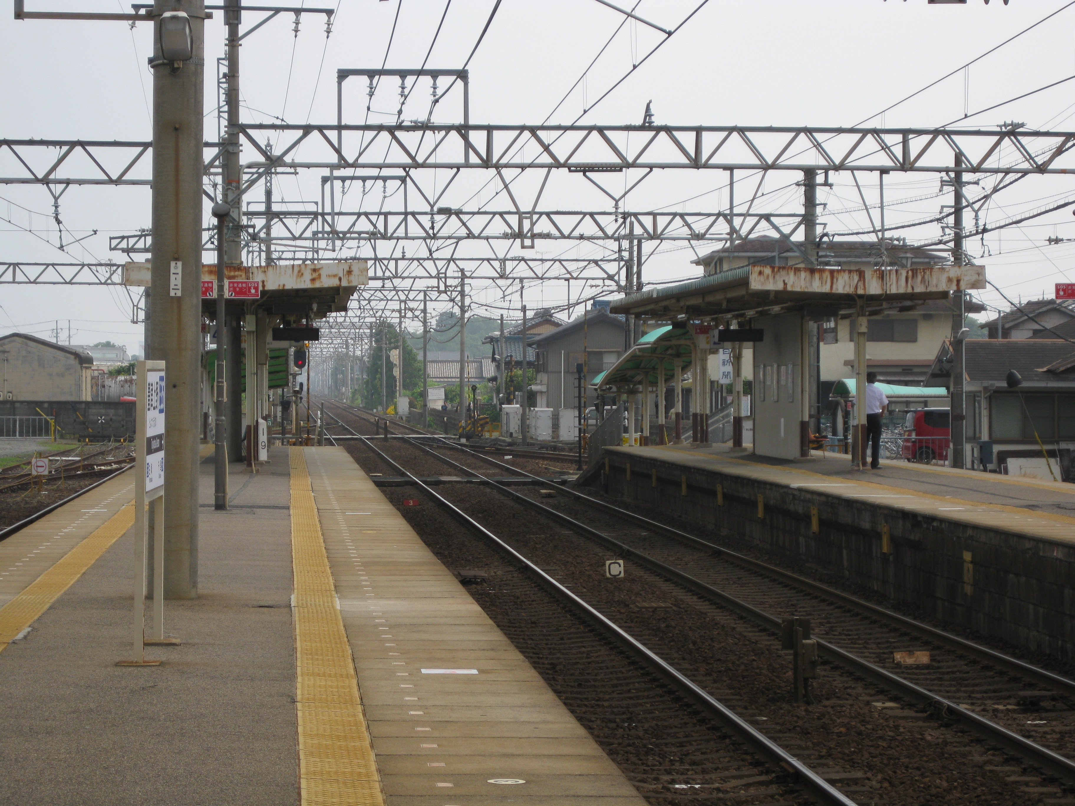 豊津上野駅プラットホーム